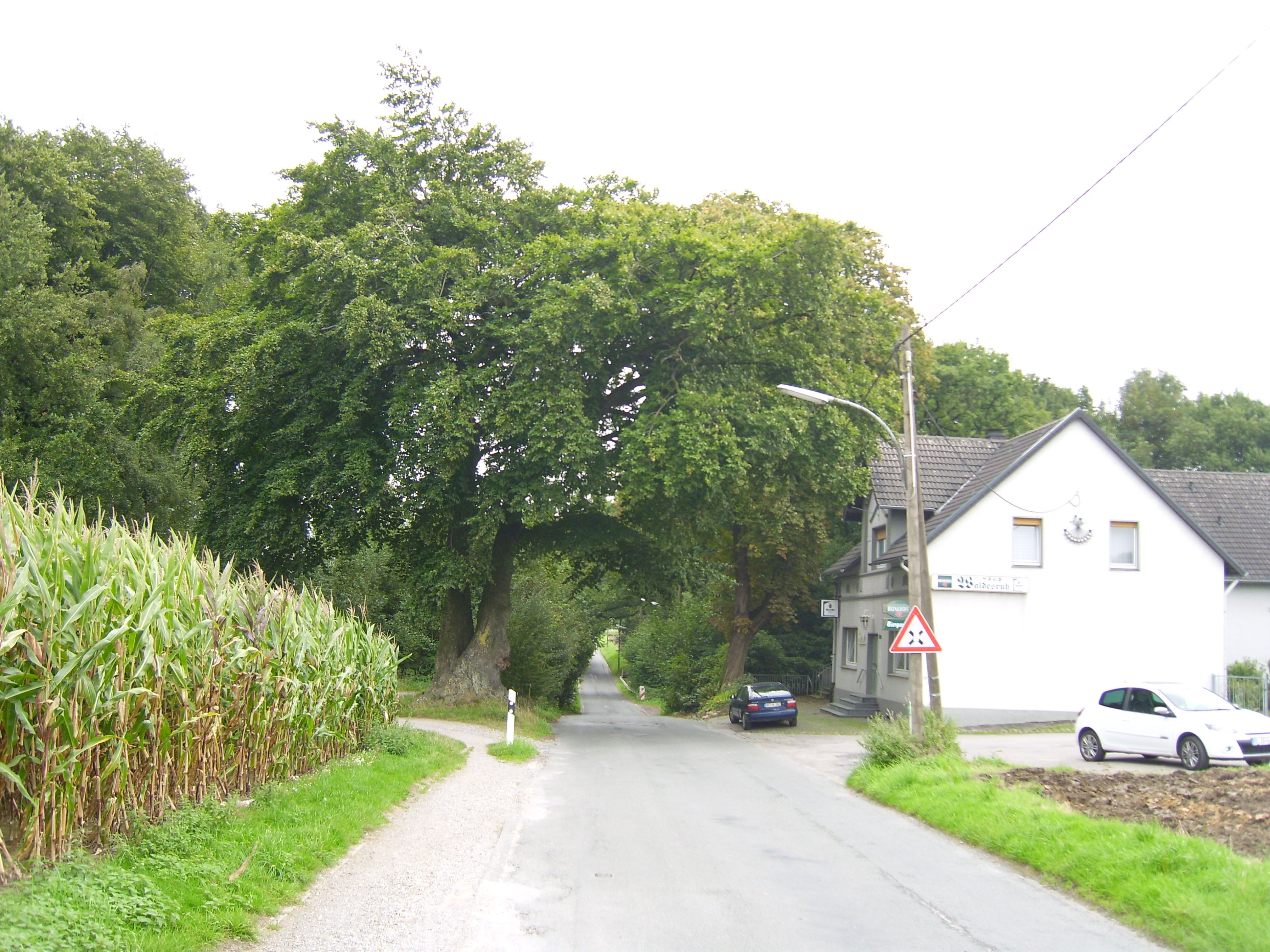 Der Lohweg am Loh nah der Lohwegsiedlung in Recklinghausen; links die alte Buche, rechts das zwischen 1842 und 1892 erbaute Haus der Gaststätte Wember (Haus Waldesruh) am Lohweg 122